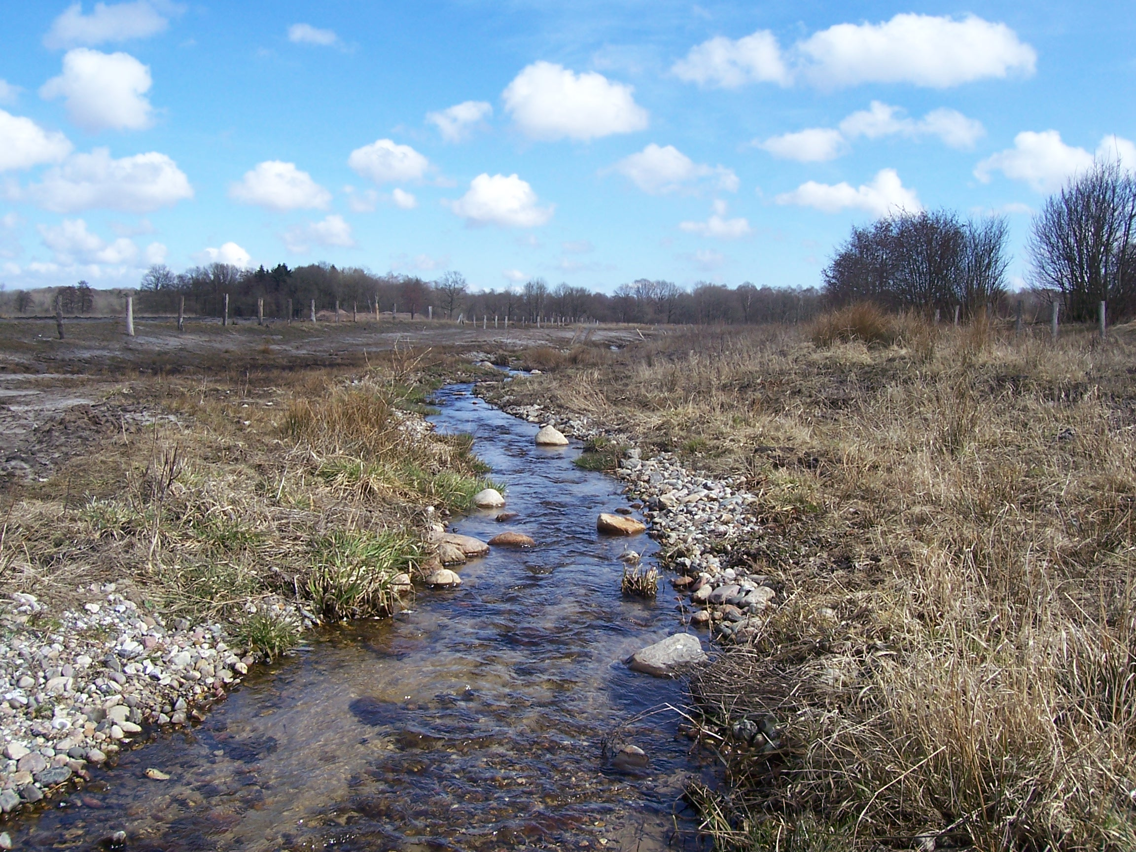 Unterlauf der Glasbek ca. ein Jahr nach der Renaturierung im April 2013